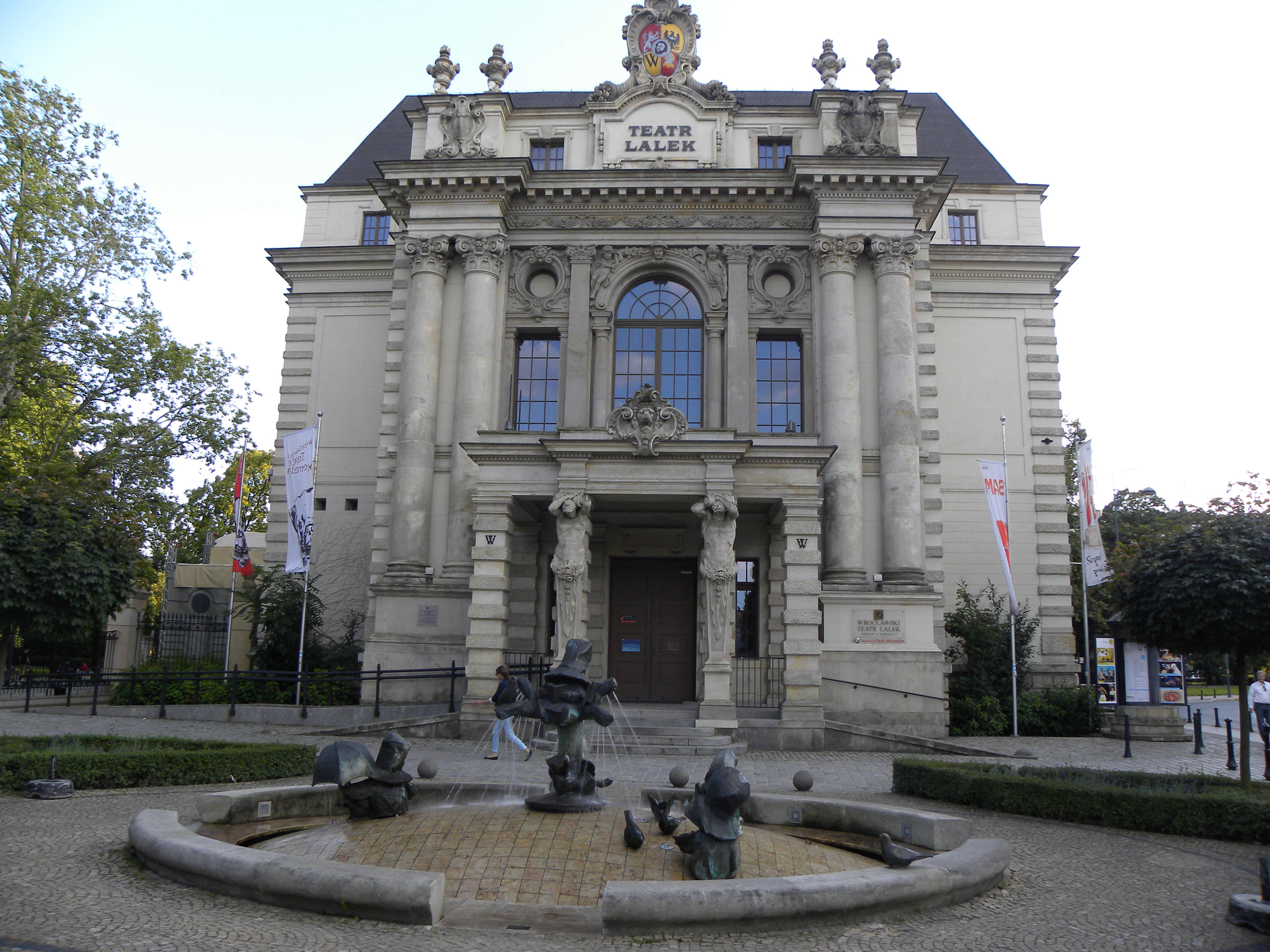 fotoreportaż przedstawiający: budynek wrocławskiego Teatru Lalek - od frontu; szatnię, rekwizytornię, lalkarnię, garderobę, widownię, scenę English | Polski | +/−